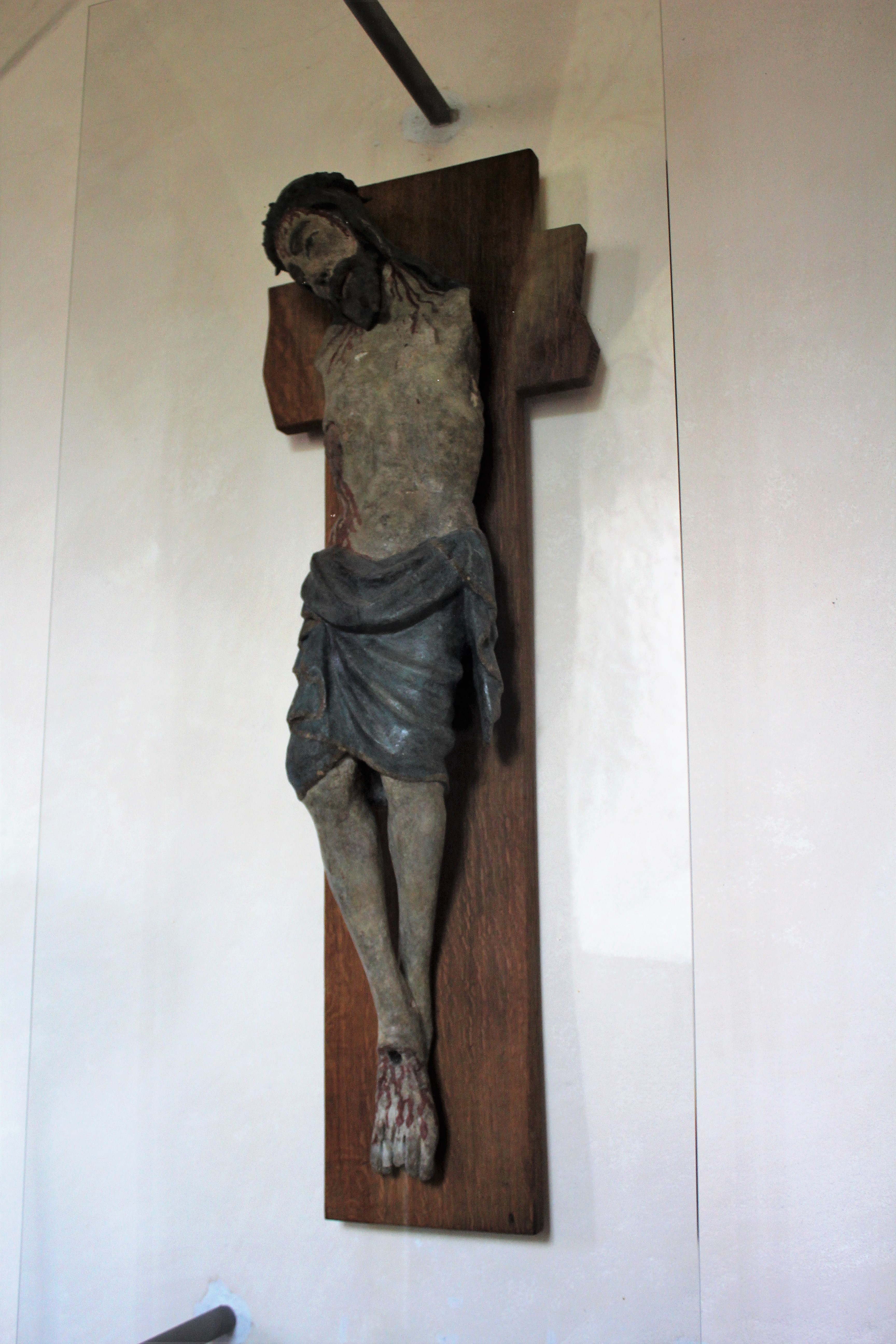 Evangelische Kirche Münster, Laubach, Landkreis Gießen, Hessen, Deutschland